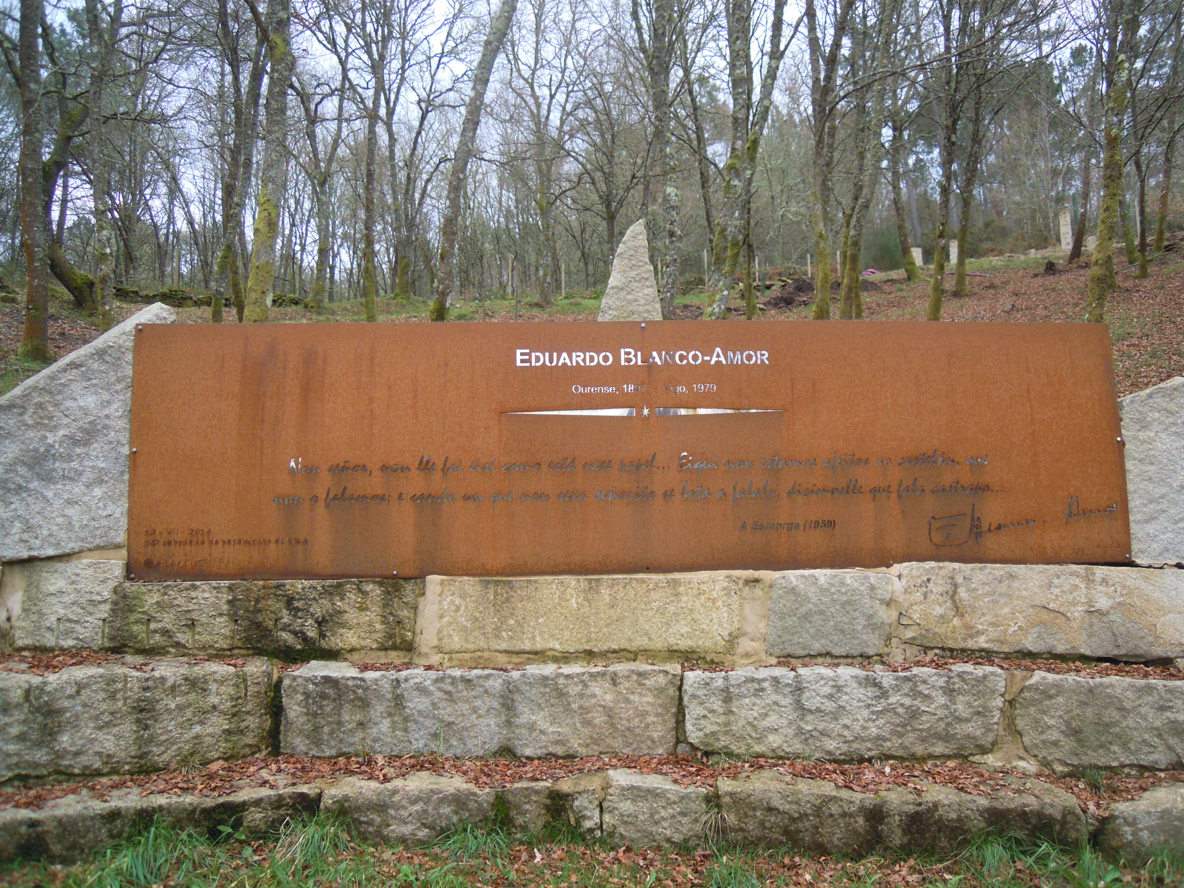 Extracto da novela A esmorga de Eduardo Blanco Amor na Insua dos Poetas